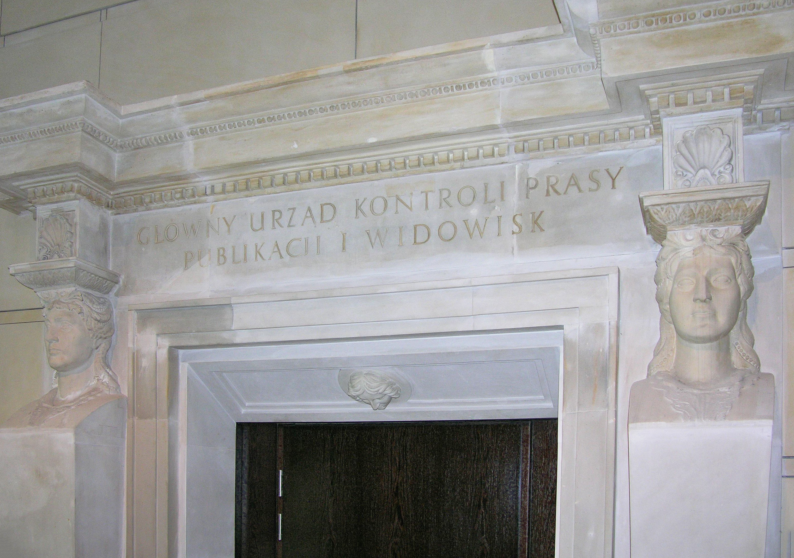 Zachowany portal ze zburzonego gmachu Głównego Urzędu Prasy, Publikacji i Widowisk w holu biurowca Liberty Corner w Warszawie